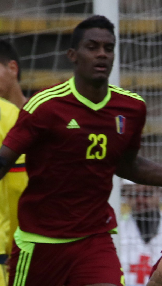 COLOMBIA VENEZUELA 5 MAV